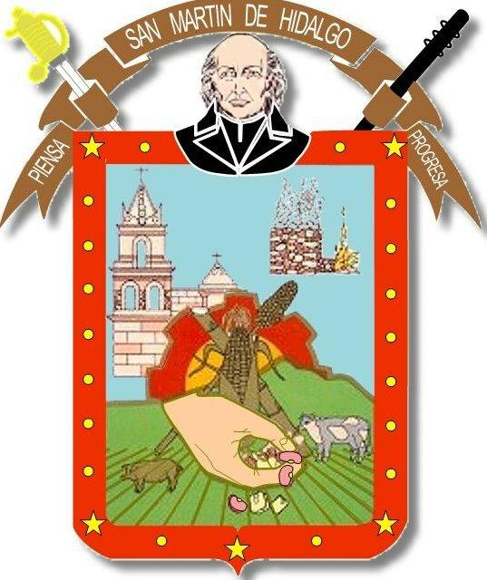 escudo de armas san martin de hidalgo